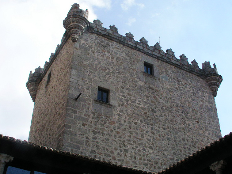 Torreon de los Gusmanes, Ávila de los Caballeros, Spain.